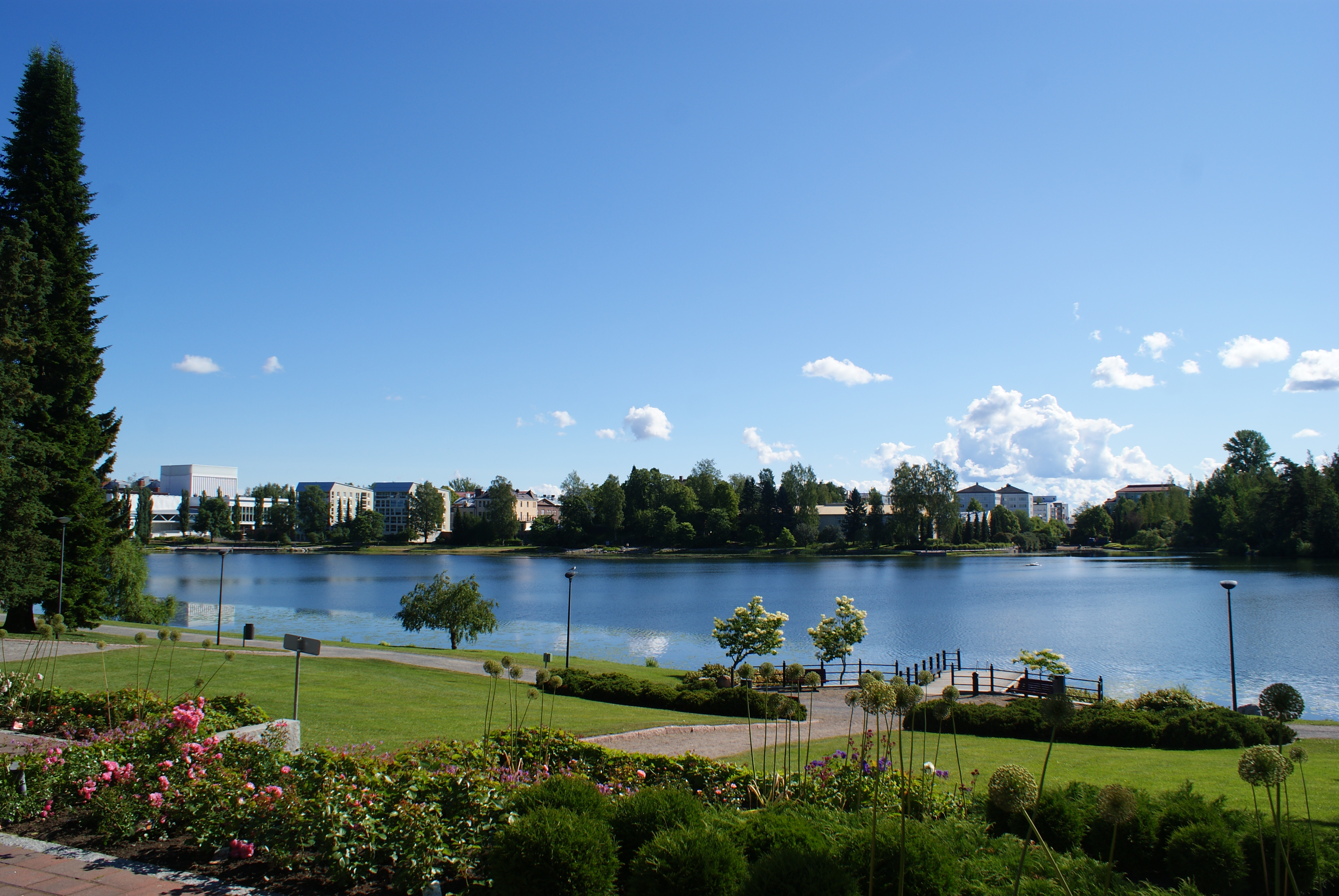 Valkeisenlampi kesällä 2019.